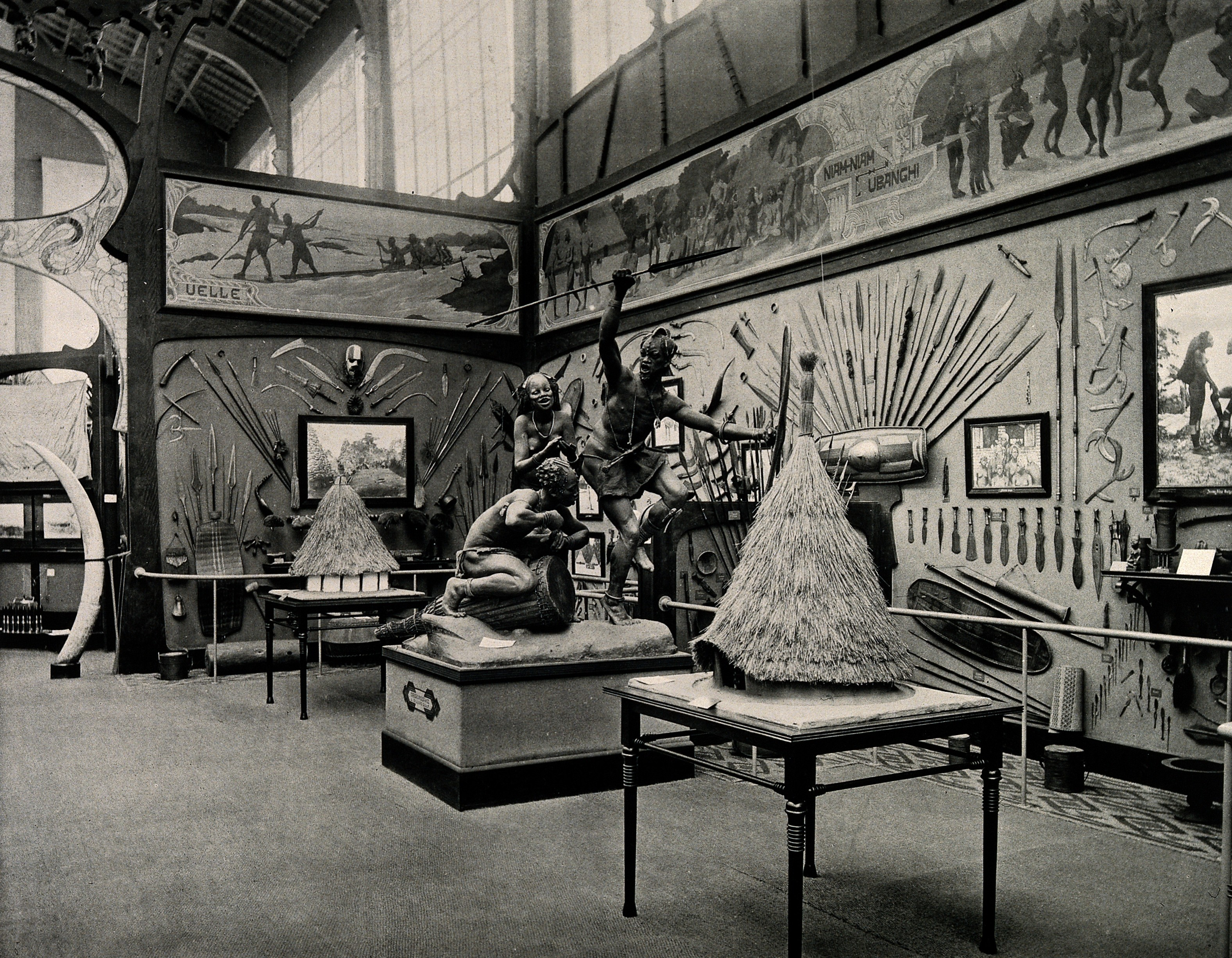 Musée du Congo, Tervuren, Belgium: one of five interior scenes. Collotype. Iconographic Collections Keywords: Paul Hankar; Musée du Congo (Tervuren, Belgium); Gustave Serrurier-Bovy